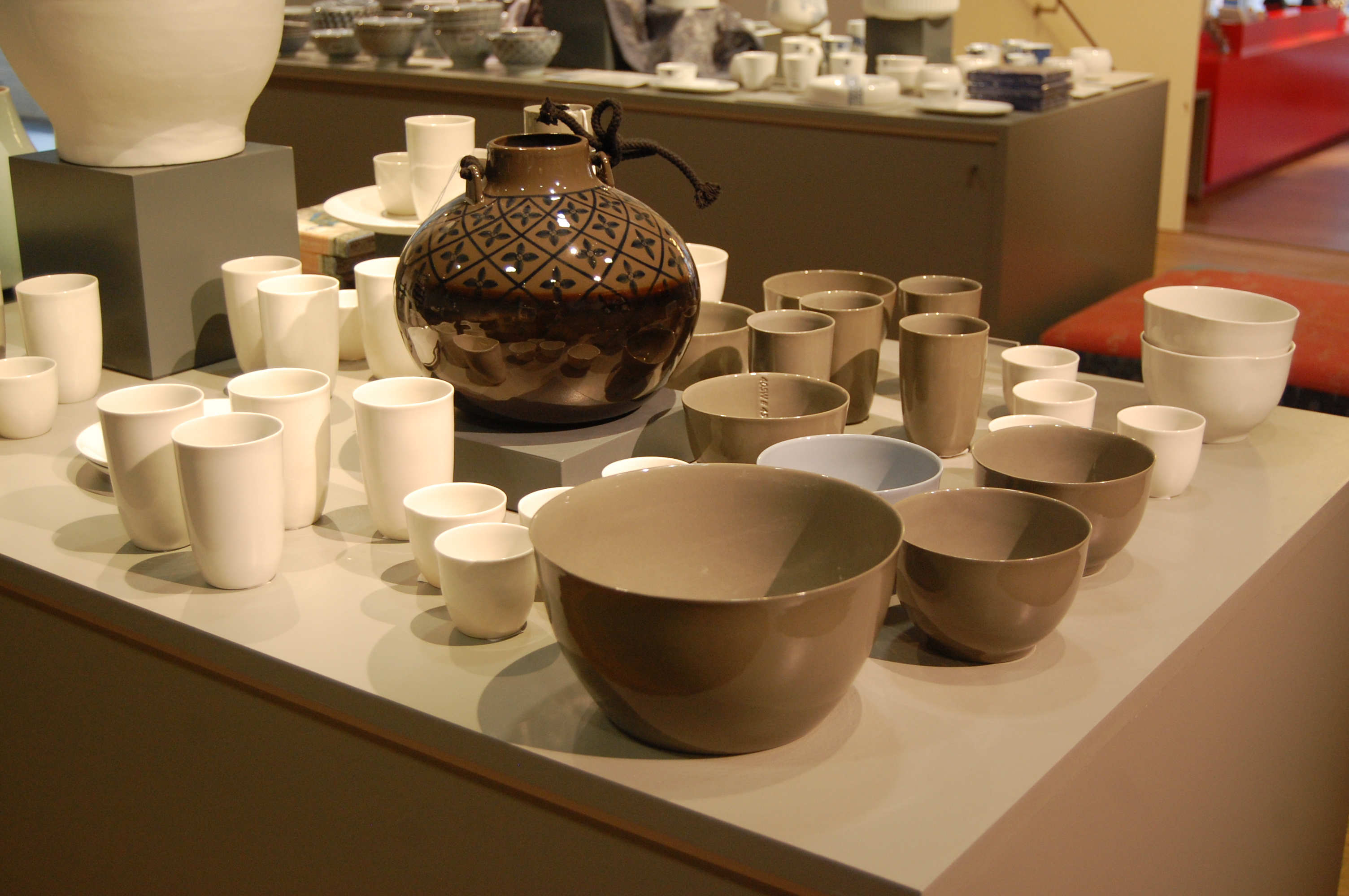 Serviesgoed ontworpen door Hella Jongerius, foto gemaakt in het Keramiekmuseum Leeuwarden